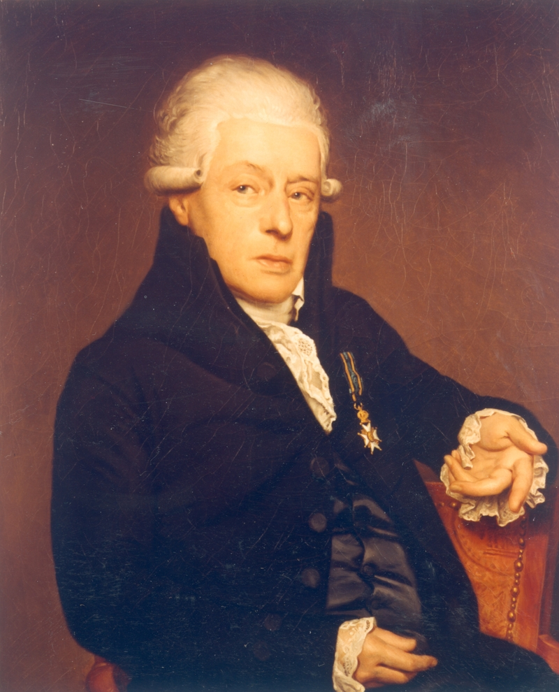 Portret van Rhijnvis Feith (1819) door Willem Bartel van der Kooi (1768-1836). Familievereniging Feith, in bruikleen bij Nederlands Letterkundig Museum